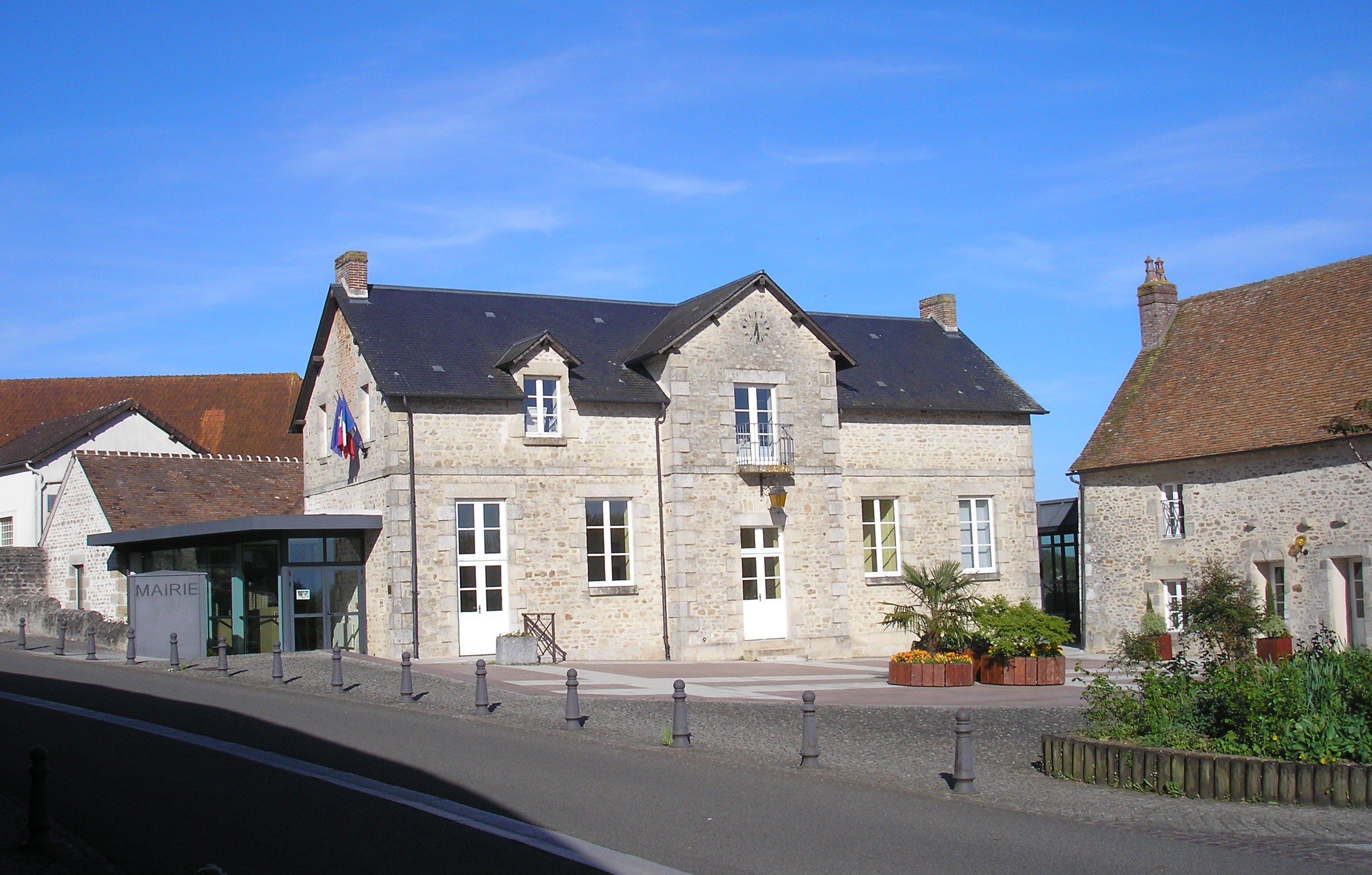 Condé-sur-Sarthe (Normandie, France). La mairie.